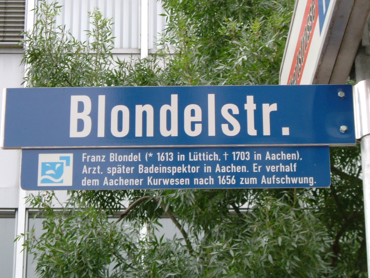 Zusatzinformationen zu Straßennamen, die in Aachen einen Bezug zum Bäderwesen und den Thermalquellen haben. (Projekt der Thermalwasserroute Aachen)